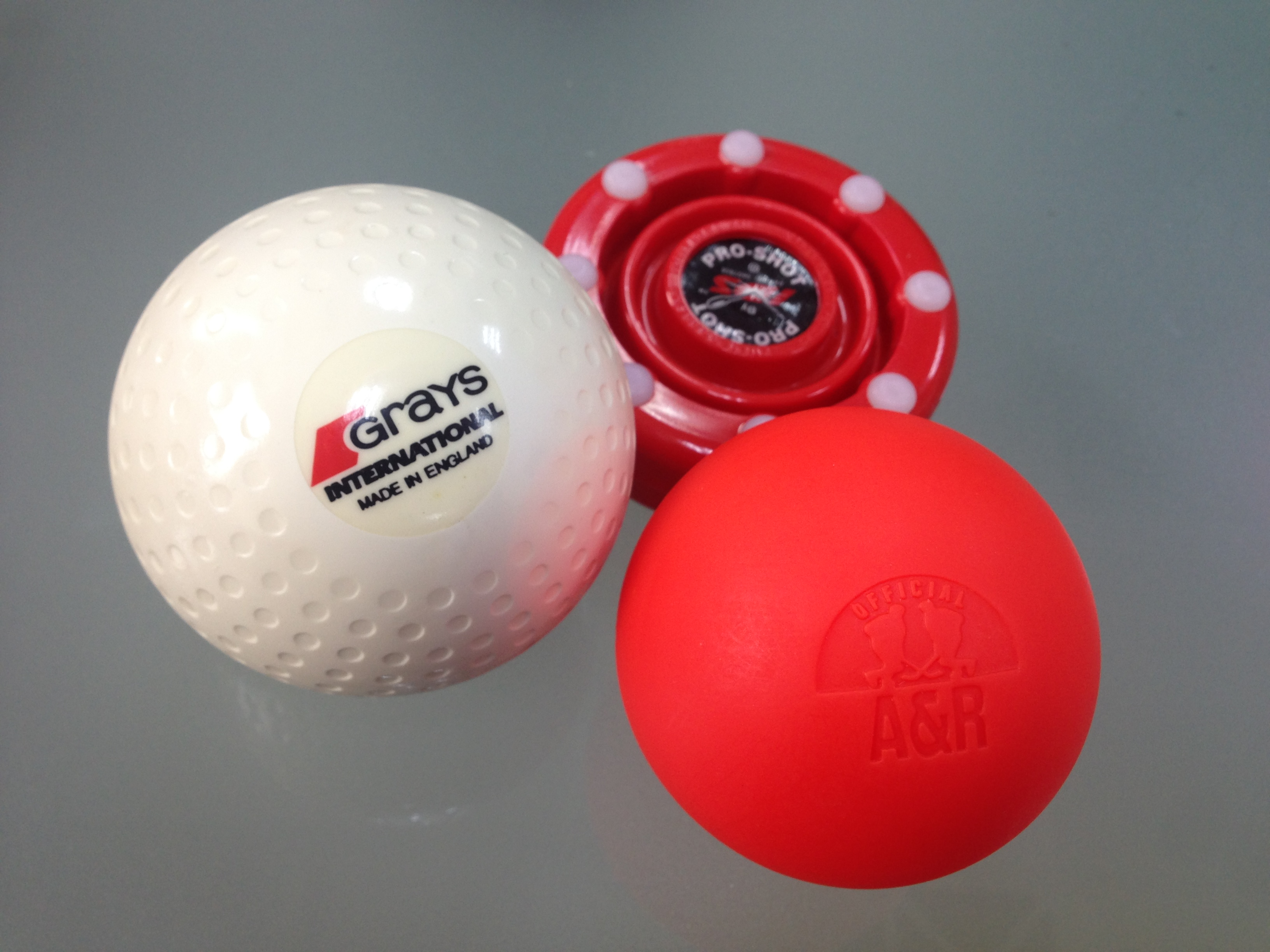 曲棍餅以及曲棍球